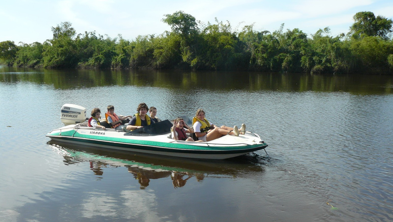 Paseando en lancha en el rio Manduvirá a la altura del puerto Naranjahai